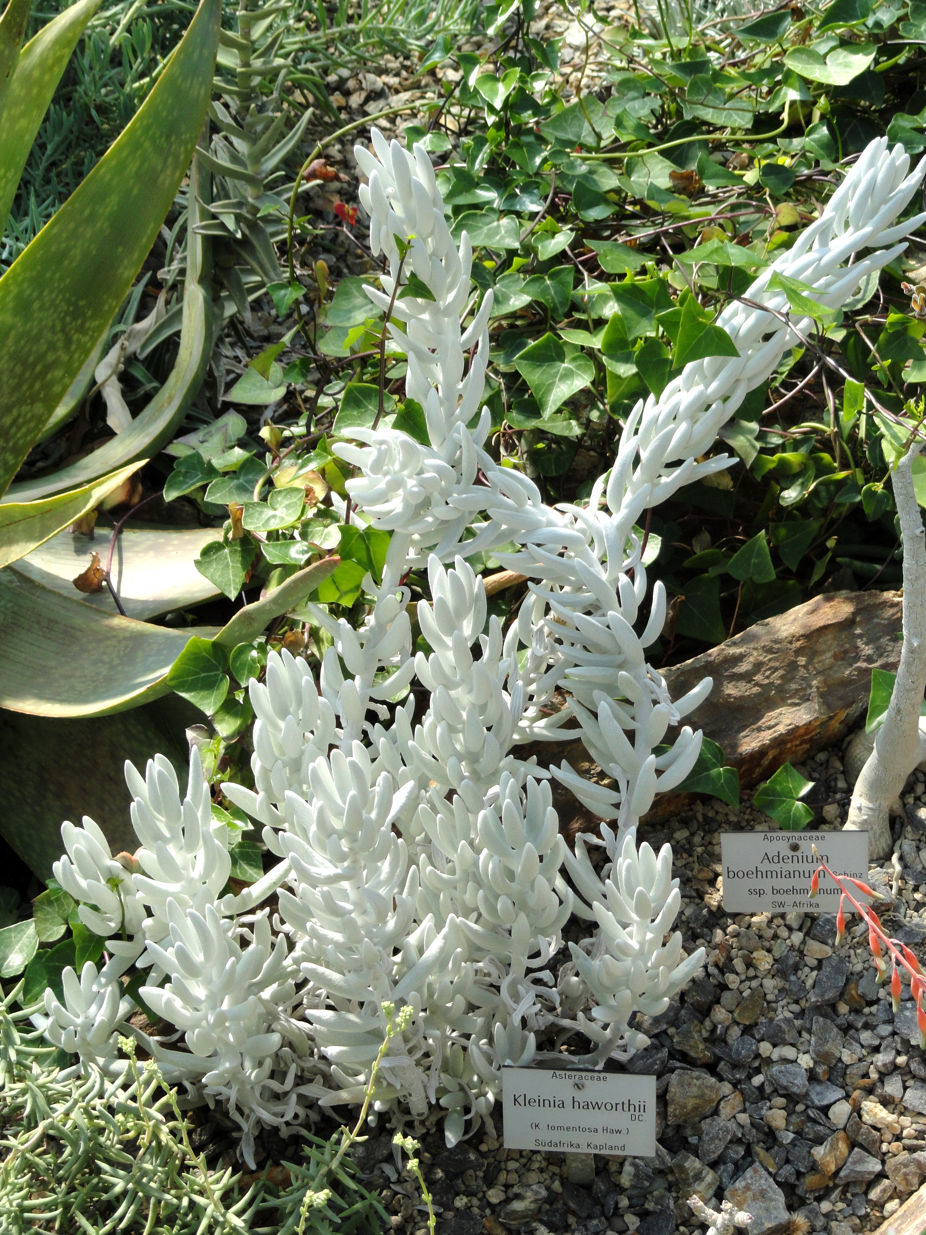 Senecio haworthii specimen in the Botanischer Garten München-Nymphenburg, Munich, Germany.